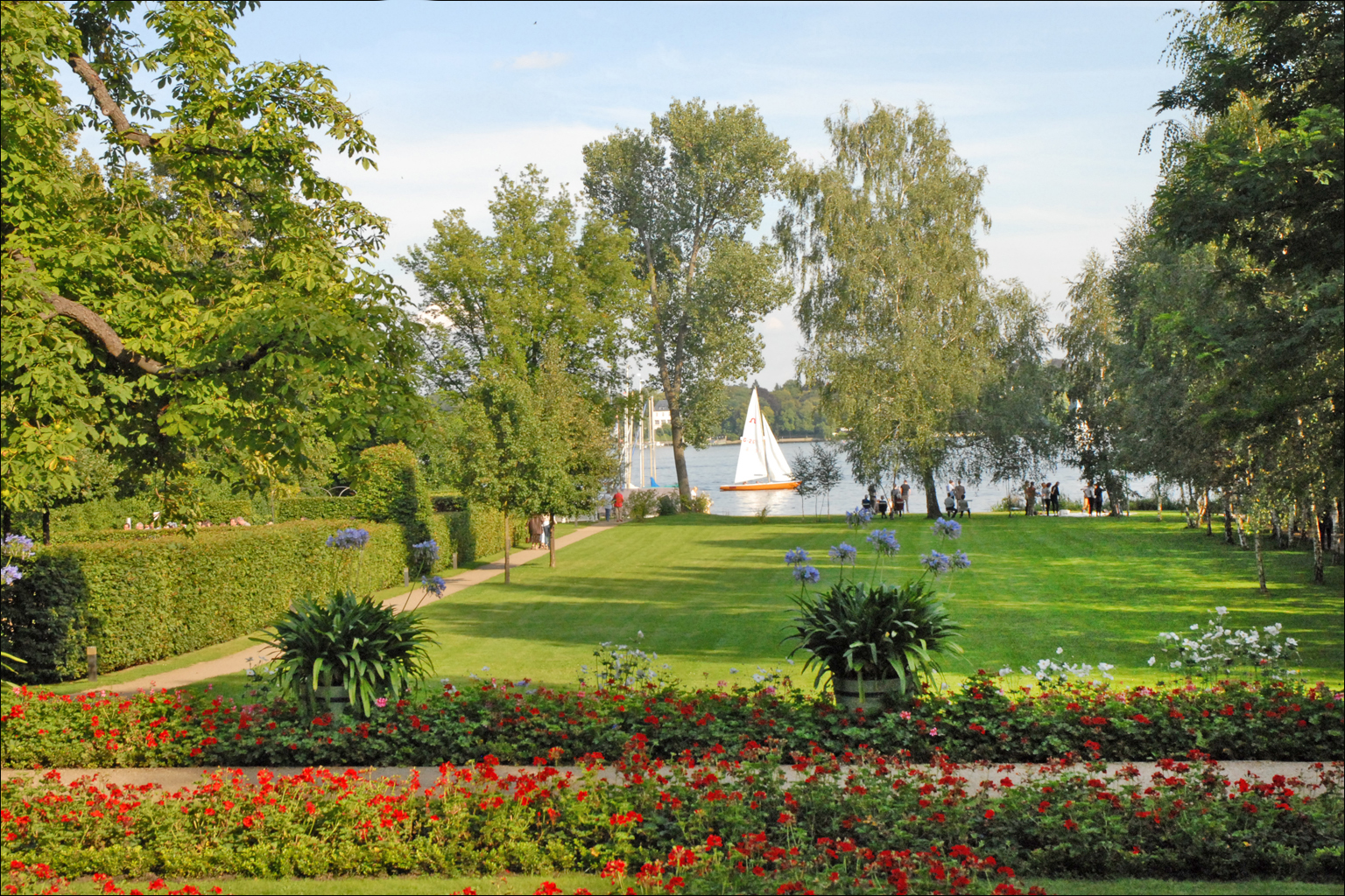 Le jardin de la villa coté lac En 1909, Max Liebermann fait construire une maison d'été au bord du lac "Wannsee". Après avoir passé tous ses étés en Hollande où il peint de très nombreuses oeuvres, Wannsee devient pour lui un refuge loin de Berlin et de son agitation. Plus de 200 toiles ont été créées dans le parc de sa villa. En 1940, à cause des origines juives de la famille, sa veuve est dépossédée par le régime national-socialiste de la villa qui, après la guerre, en 1951, est rendue à la fille de l'artiste. Elle est ensuite vendue à la ville de Berlin par les héritiers et ce n'est qu'en 1997 que la villa peut devenir un musée. Après une longue période de travaux pour restituer l'ensemble selon les plans d'origine, la villa et son parc sont ouverts au public en avril 2006 avec l'aide de nombreux donateurs et bénévoles. Site de la villa de Max Liebermann (Berlin) Article Wikipedia sur Max Liebermann